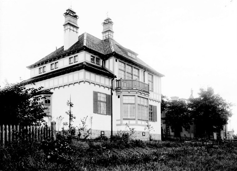 Häradshövding Gösta Huselius villa, Villa Jägarbacken på Djurgården